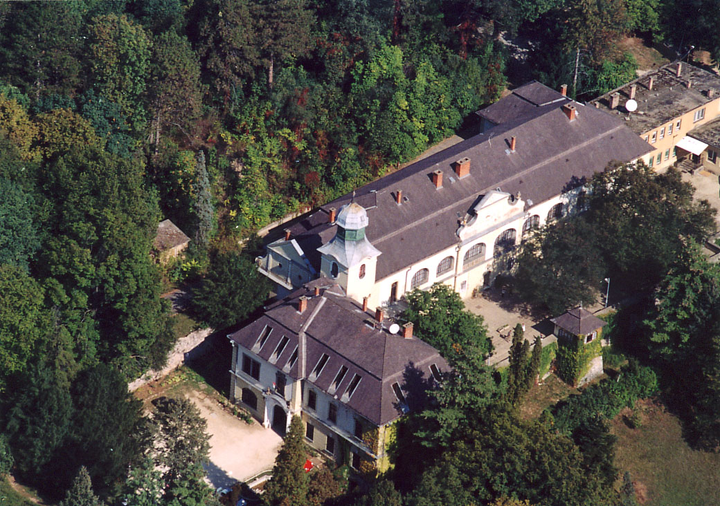 Palace - Tornanádaska - Hungary - Europe